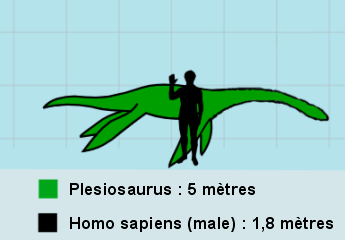 Echelle de taile du plesiosaurus par rapport à l'Homme moderne.